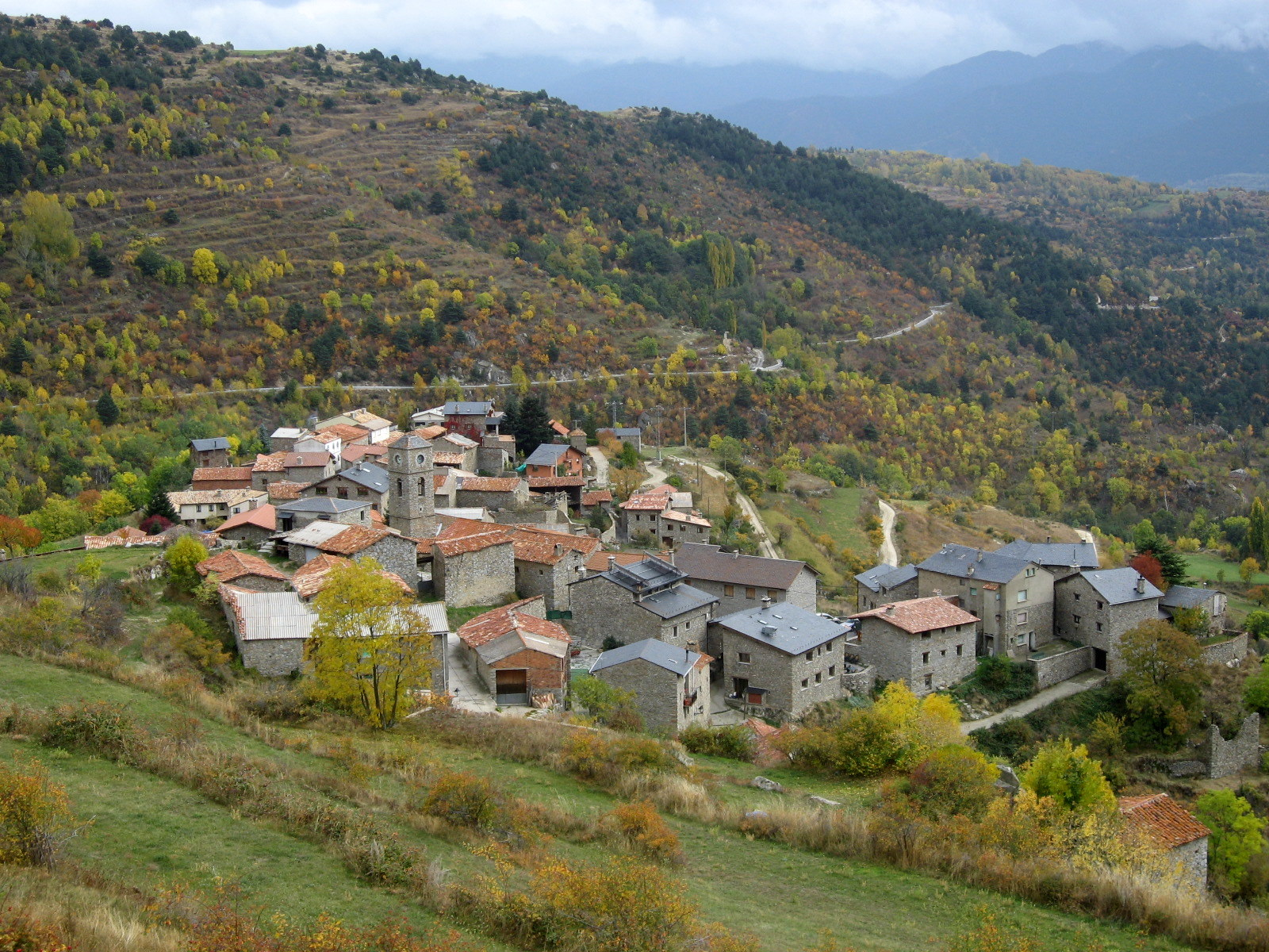 Poble d'Arànser